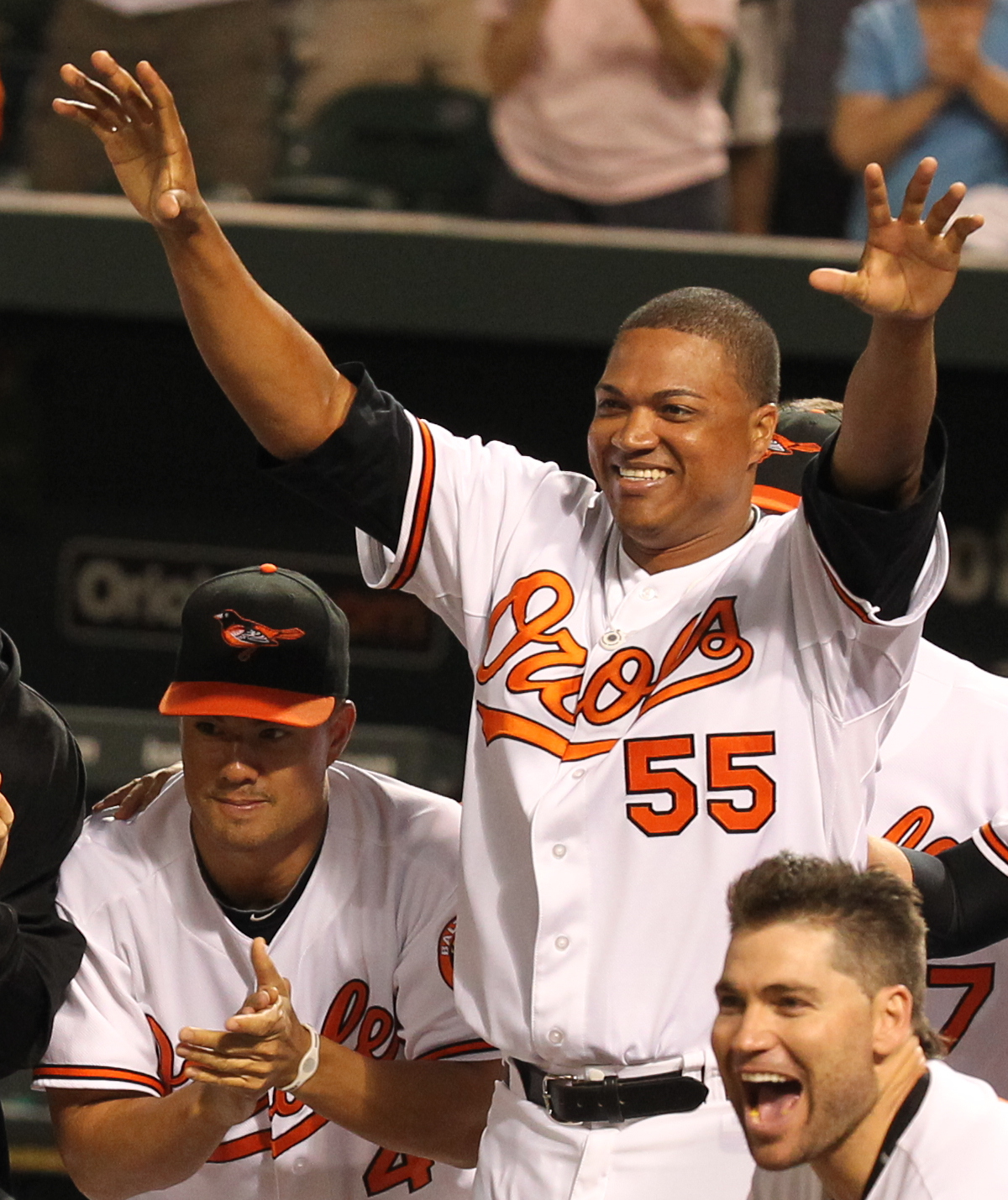 Alfredo Simón